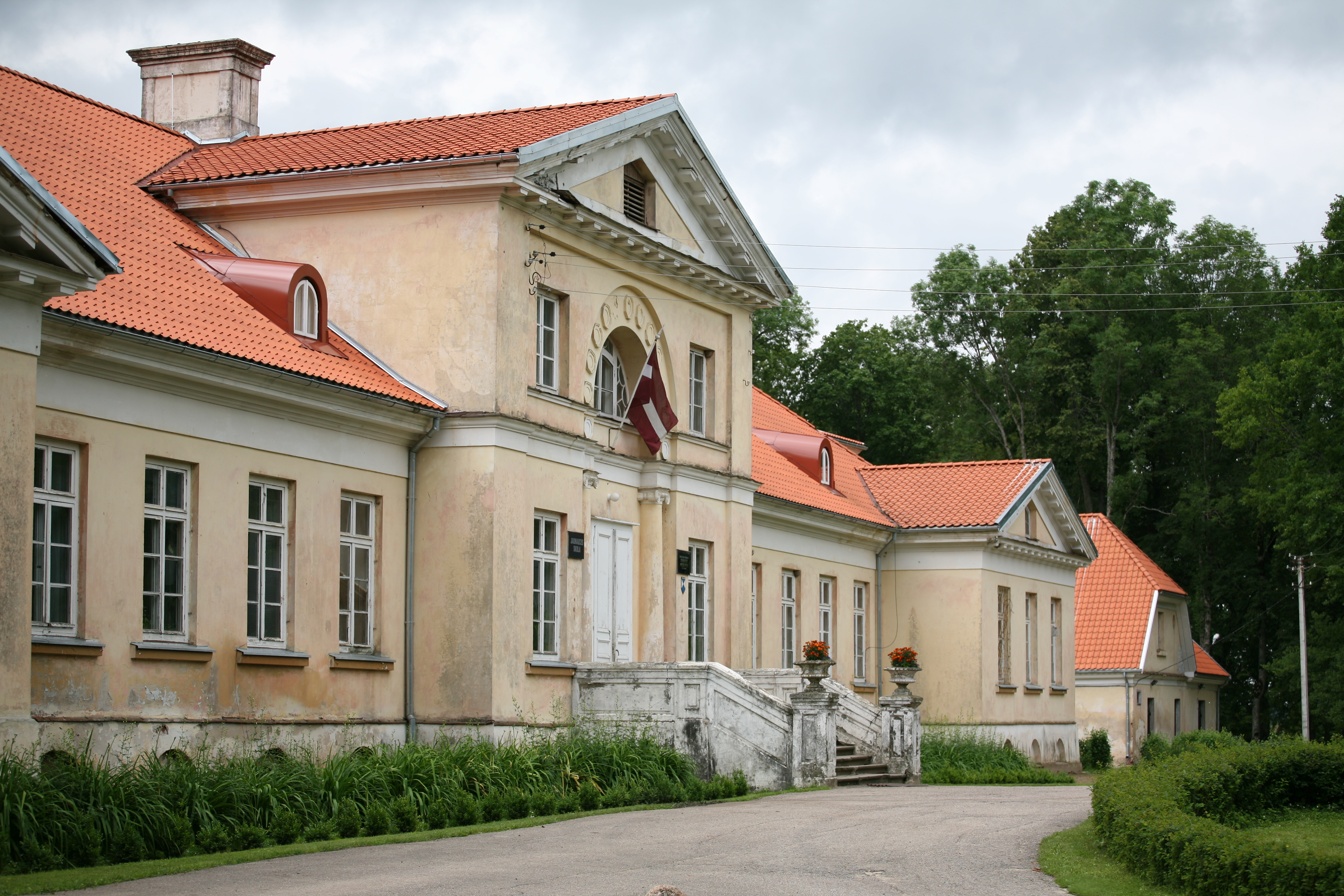 Jaunauces pils vai muiža no sētas puses